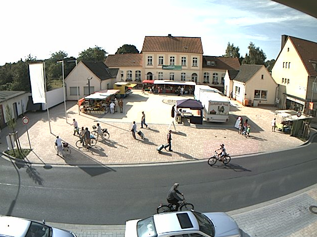 Wochenmarkt am Samstag auf dem Gemeindeplatz aus der Perspektive der UnserMassen.de - Webcam